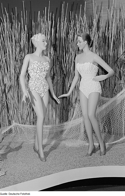 Original image description from the Deutsche Fotothek Badetextilien für Damen an Mannequins auf der Leipziger Herbstmesse 1954